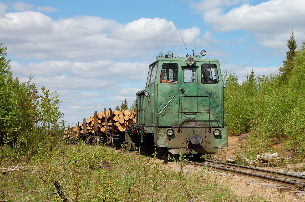 Тепловоз ТУ6А-3129(ТУ7-1331), Конецгорская УЖД